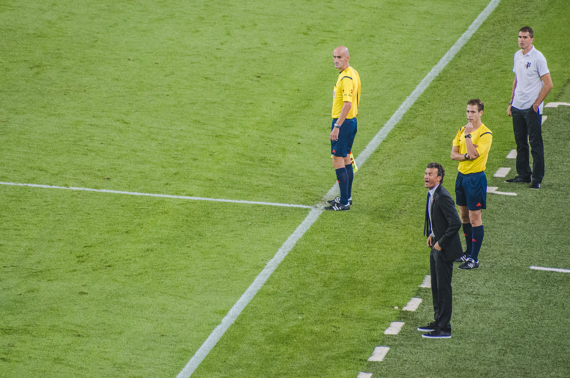 Luis Enrique as a coach of FC Barcelona. Barça - Eibar, 18.10.2014